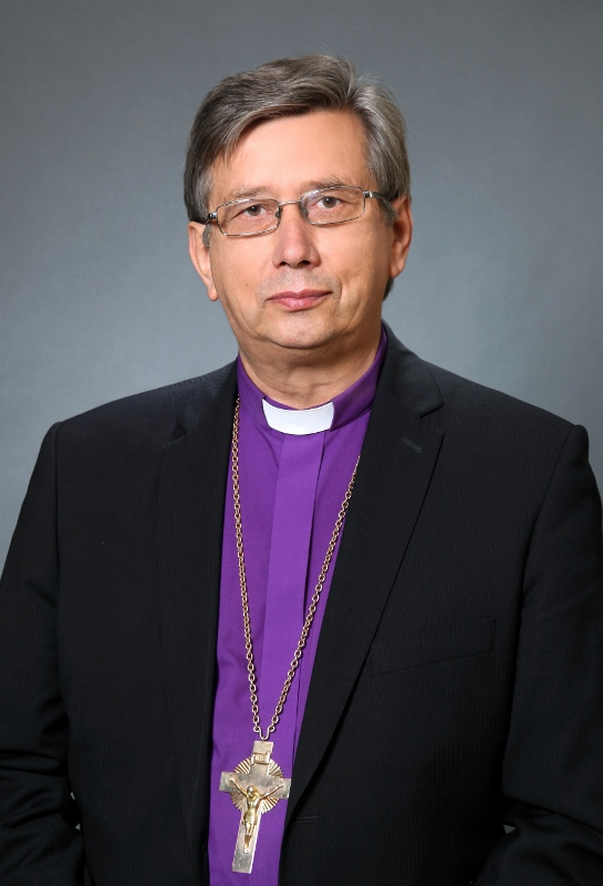 Joel Luhamets